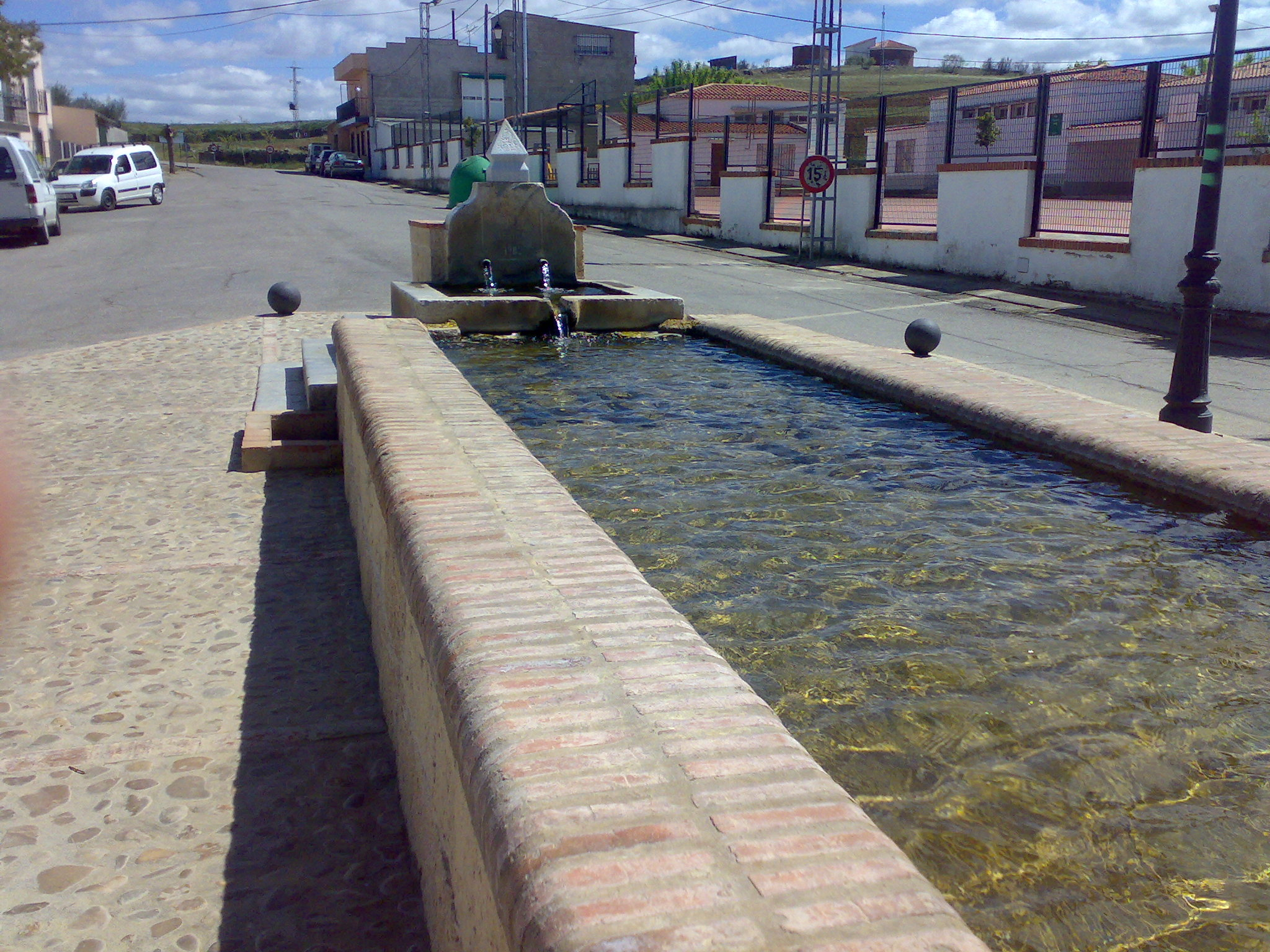 Pilar de Arriba en Atalaya (Badajoz)